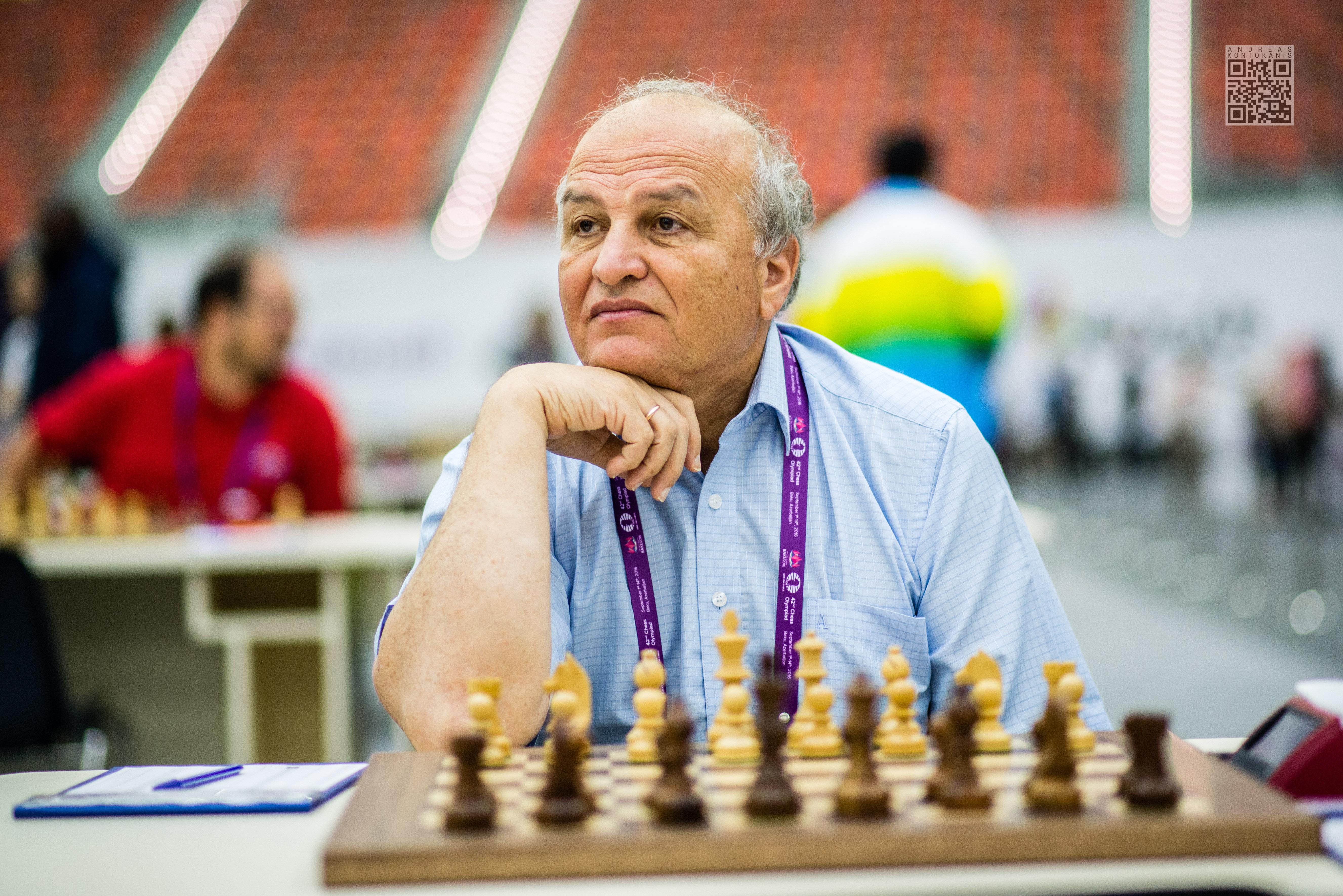 Beliavsky Alexander